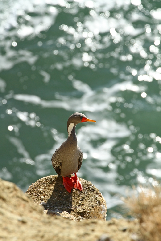 Buntscharbe, Phalacrocorax gaimardi in der nähe von Puerto San Julian in Argentinien.